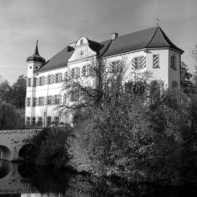 Blick über den Wassergraben auf das Wasserschloss in Niederarnbach.